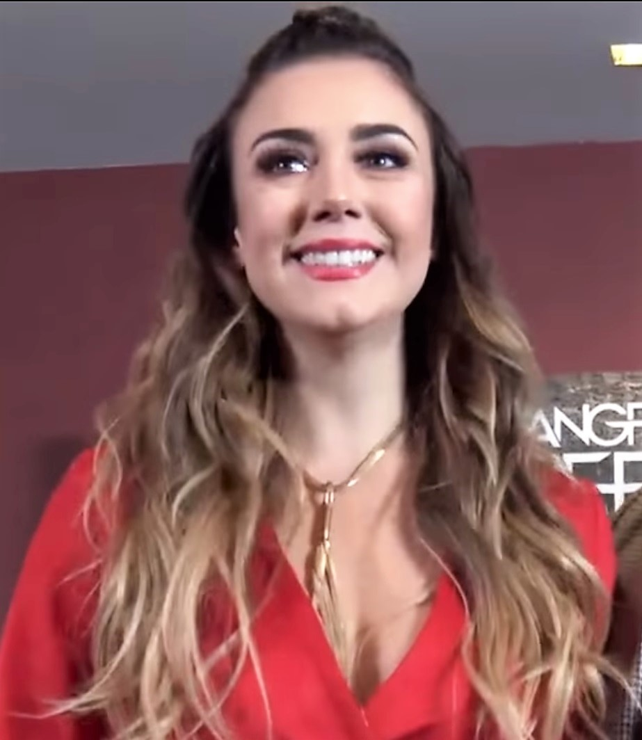 Lambda García y Ana Belena me enseñan actuar 🍭 escenas de amor Telemundo estrenará el miércoles 29 de noviembre a las 9pm/8c, su nueva producción original “Sangre de mi Tierra”, que marca el debut actoral de Ana Belena en la pantalla de Telemundo y el regreso de Lambda García luego de su participación en “El Señor de Los Cielos”. Ana Belena y Lambda García, quienes dan vida a Aurora Castañeda y Juan José Montiel, respectivamente, visitaron Los Ángeles para realizar entrevistas y hablaron sobre esta serie contemporánea. by Dulce Osuna